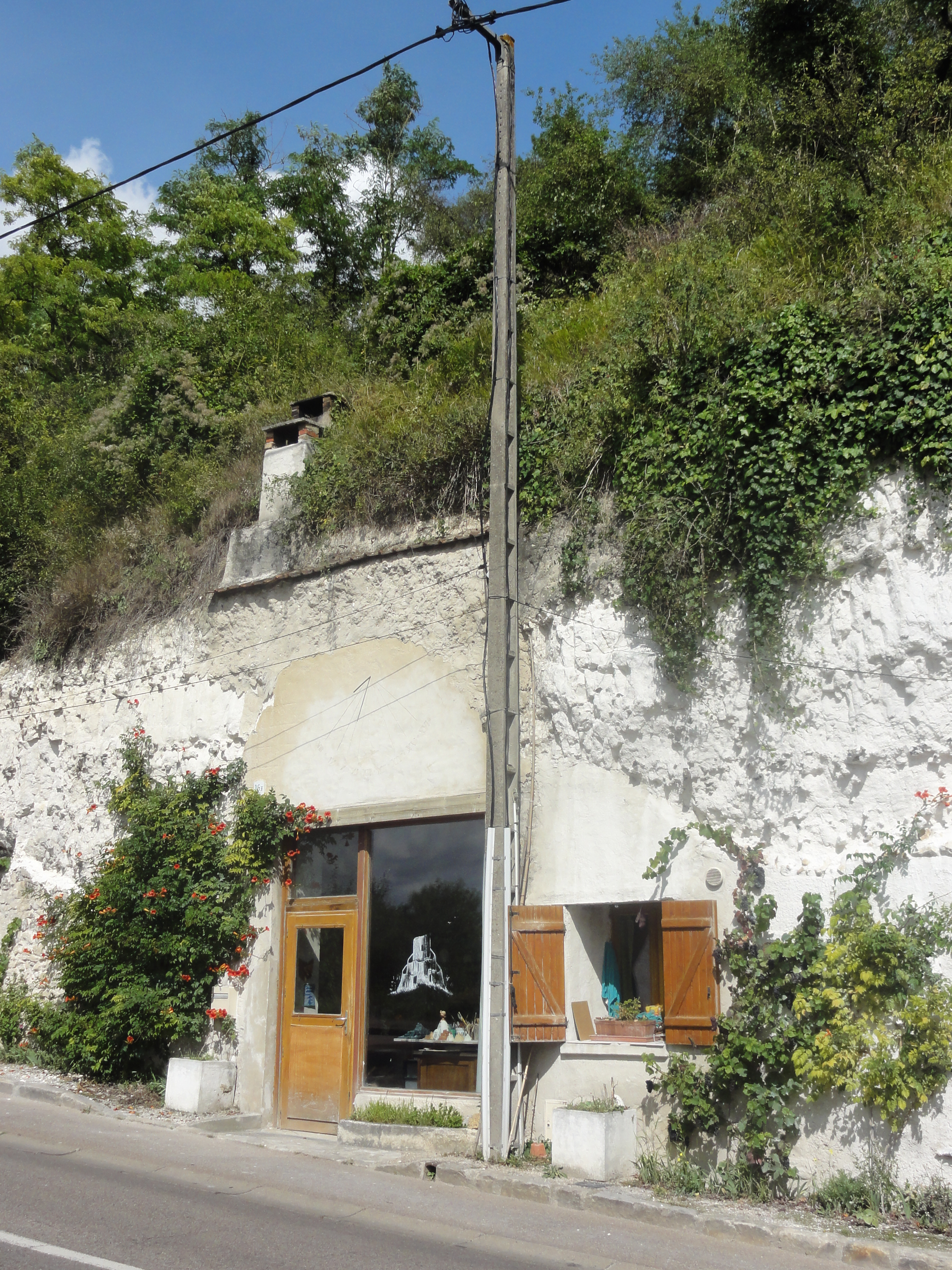 Boves, rue de Gasny.